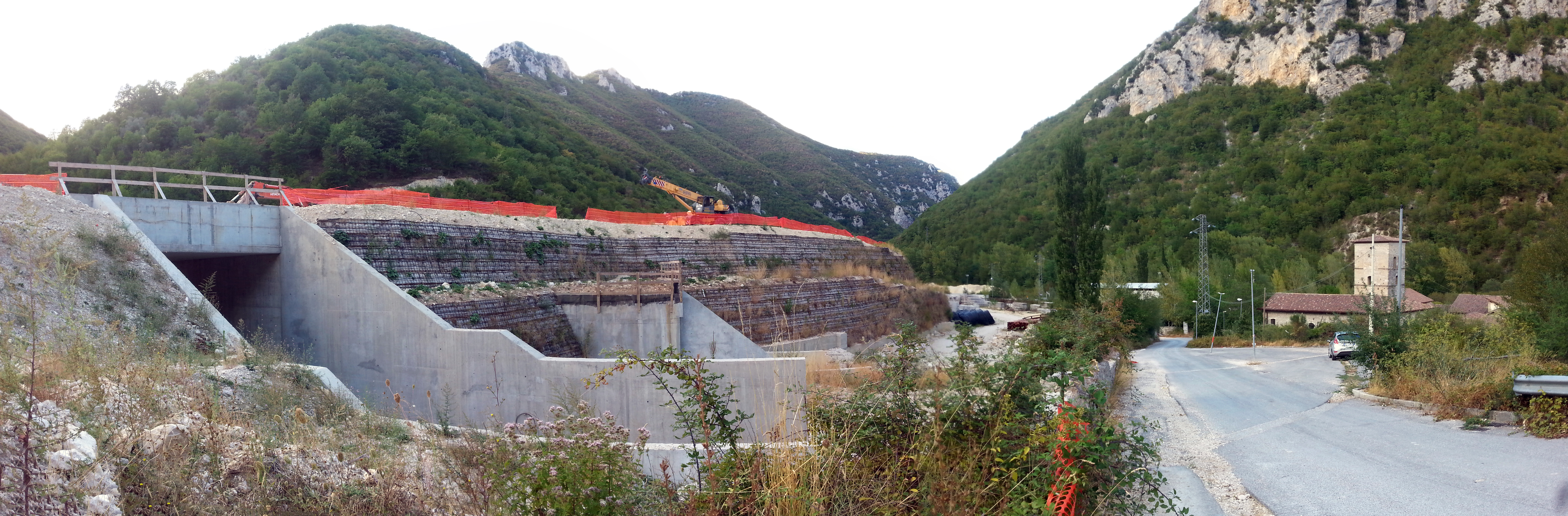 Il cantiere per la realizzazione di 3,7 km di variante a scorrimento veloce della strada statale 4 Via Salaria (tratto Micigliano-galleria Gole del Velino), come si presentava domenica 3 settembre 2017. In foto, il rilevato della rotatoria (che ha ricoperto i piloni dell'ex viadotto) fotografato dalla strada di servizio che conduce all'abbazia di San Quirico; a destra, l'abbazia stessa.